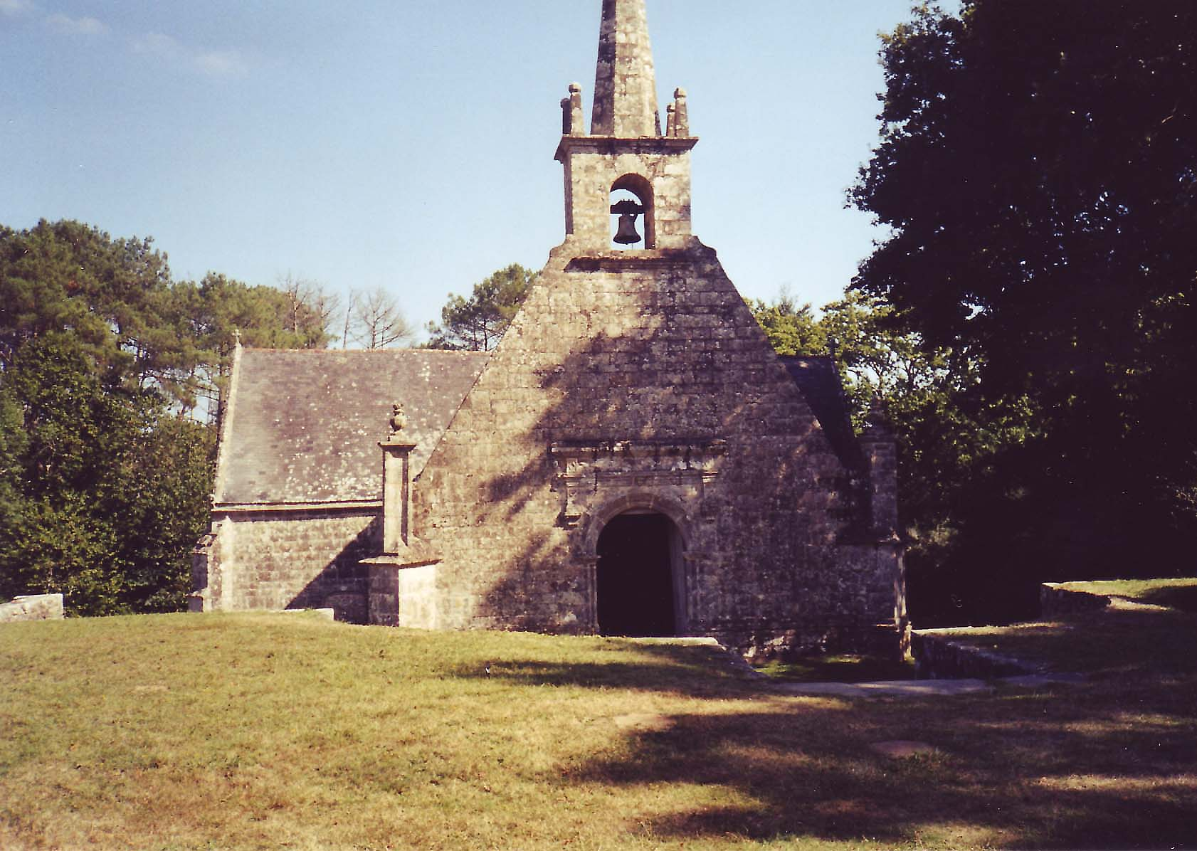 Le Bono : Chapelle Notre-Dame de Becquerel (Bretagne, Morbihan)